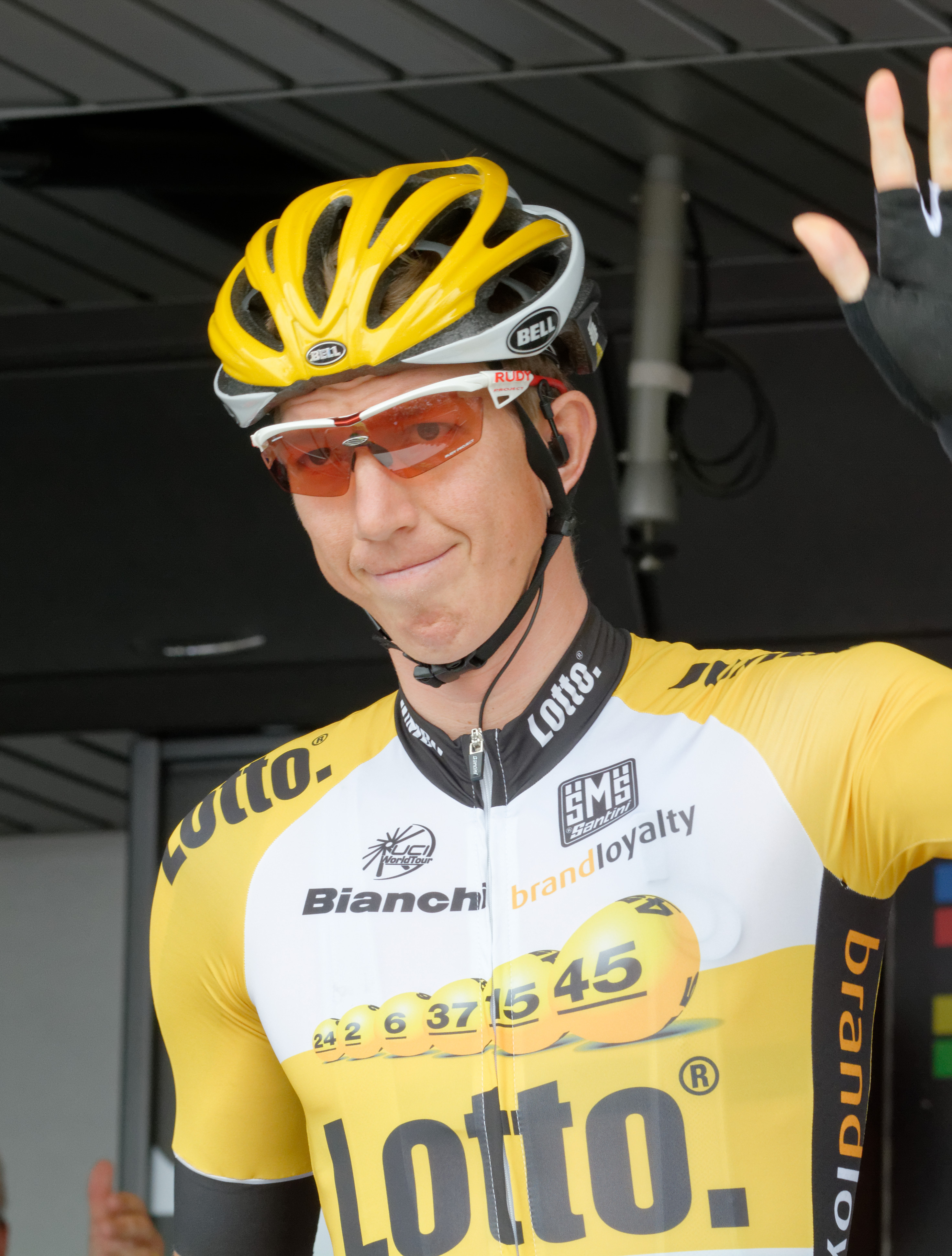 D71_9897_DxO